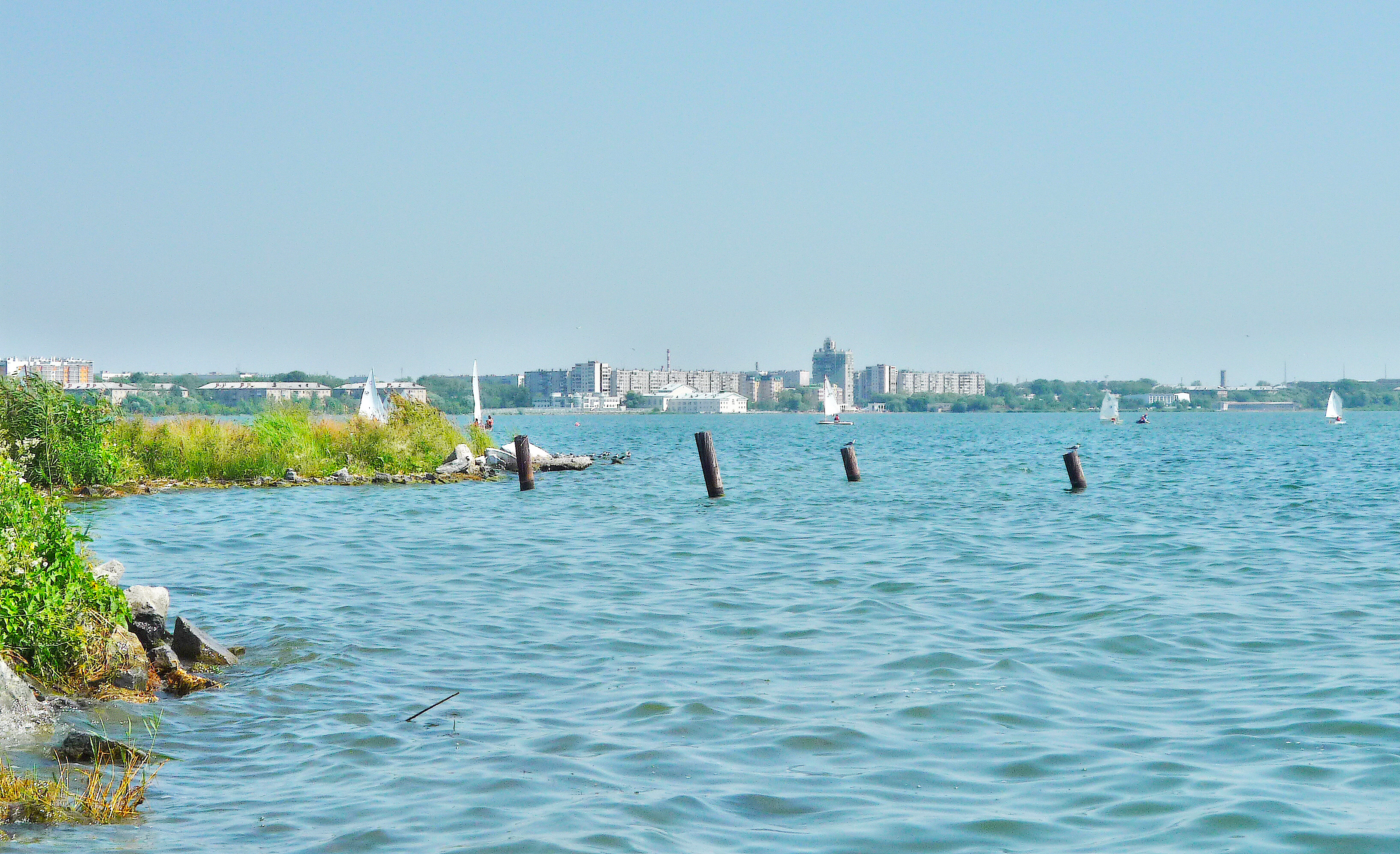 Смолино озеро: Челябинский городской округ, Челябинская область. Вид на жилые районы с северного берега озера, ориентир: дворец культуры ЧТПЗ по центру кадра. This image is related to the protected area of Russia number 7410309